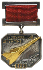 Знак «Заслуженный штурман СССР»